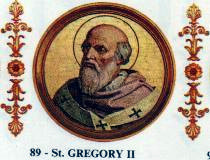 Pope Gregory II